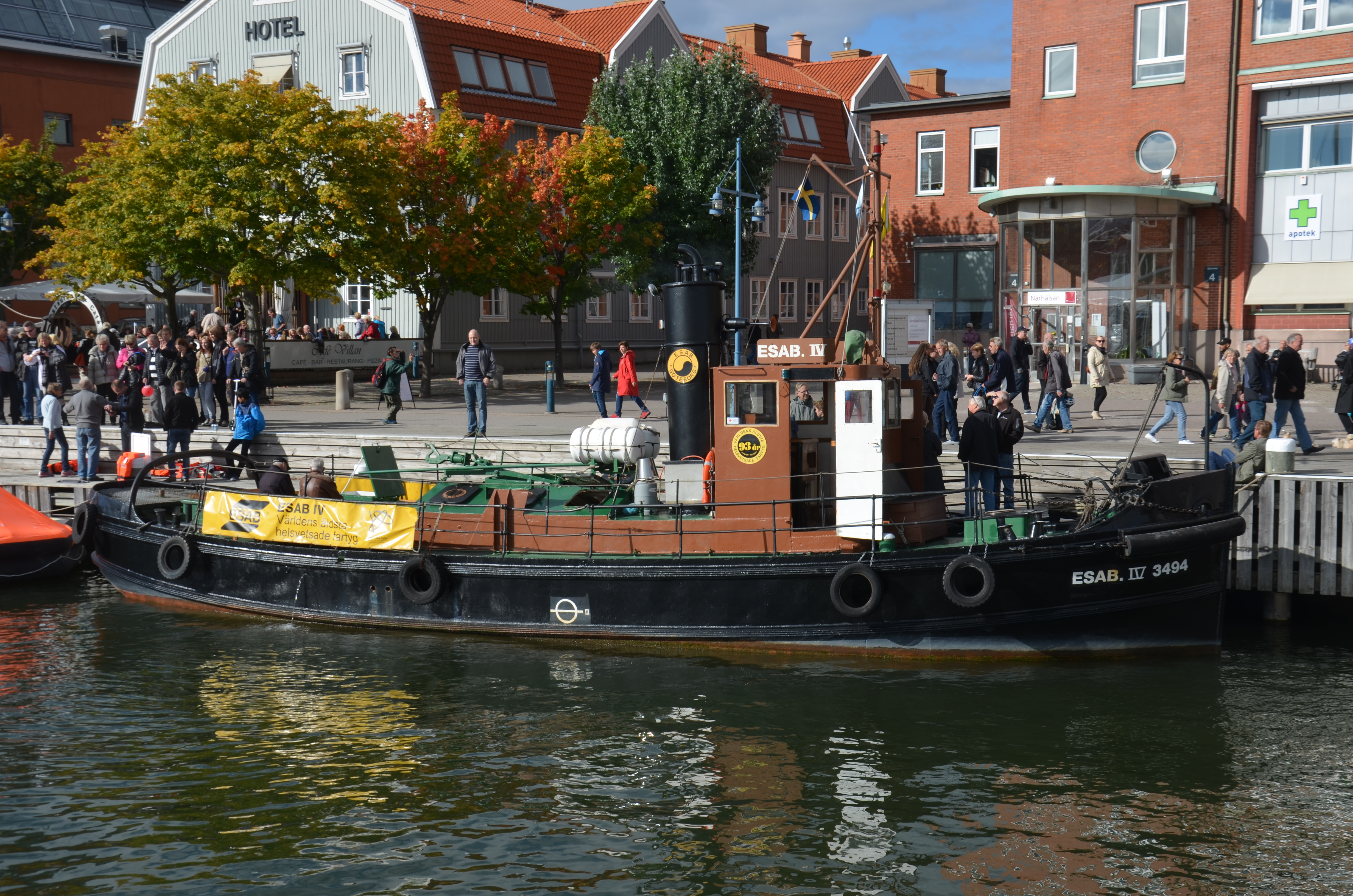 Esab IV, verkstadsfartyg i Göteborg, vid kaj i Eriksberg i Göteborg This is an image of a protected Swedish ship, with call sign SKAQ .